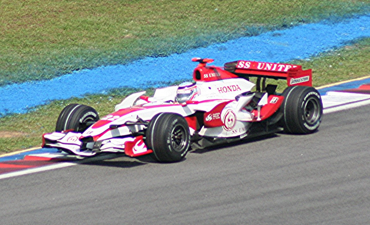 Takuma Sato driving for Super Aguri F1 in the 2007 Malaysian Grand Prix.